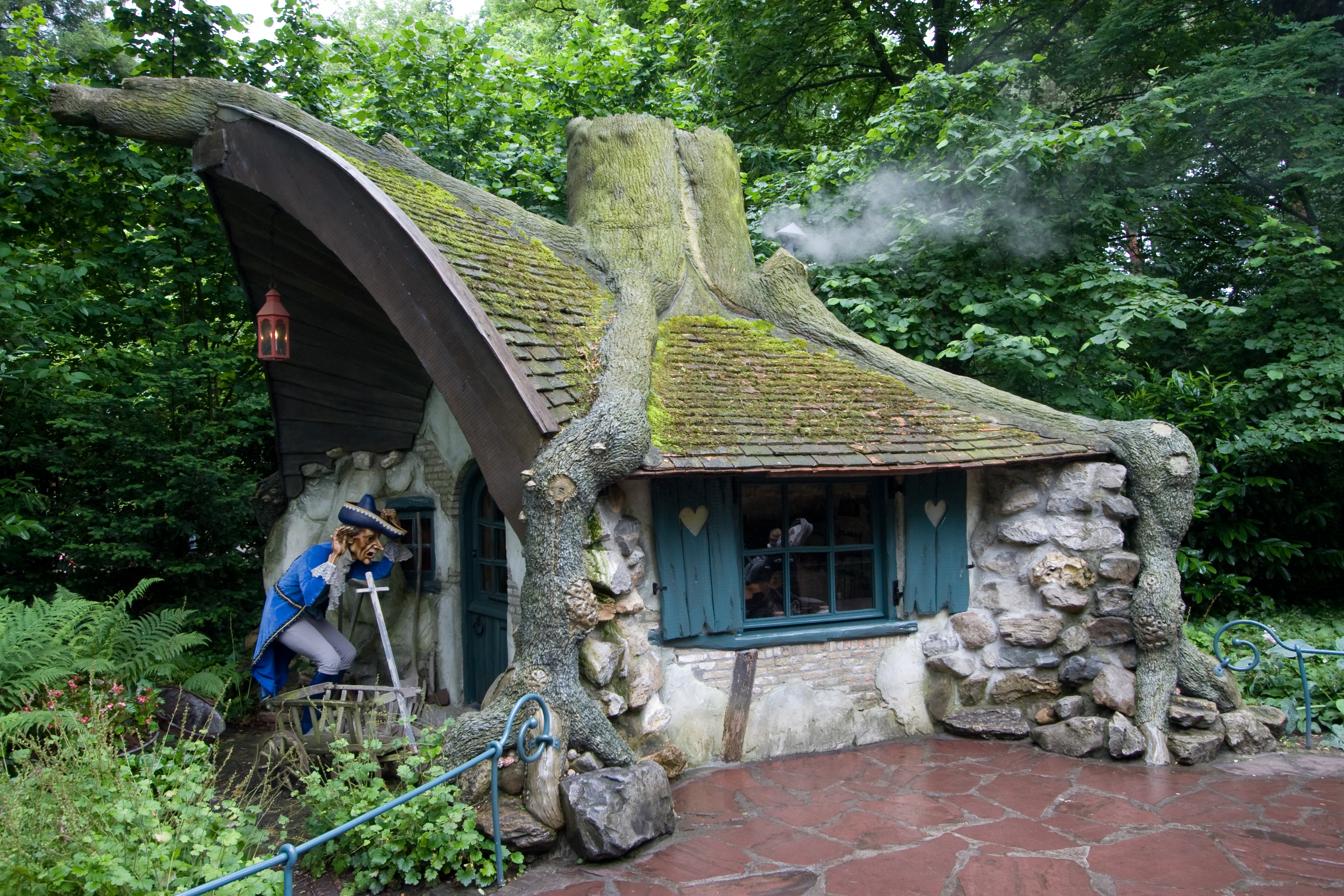 Repelsteeltje (Rumpelstiltskin) in de Efteling.